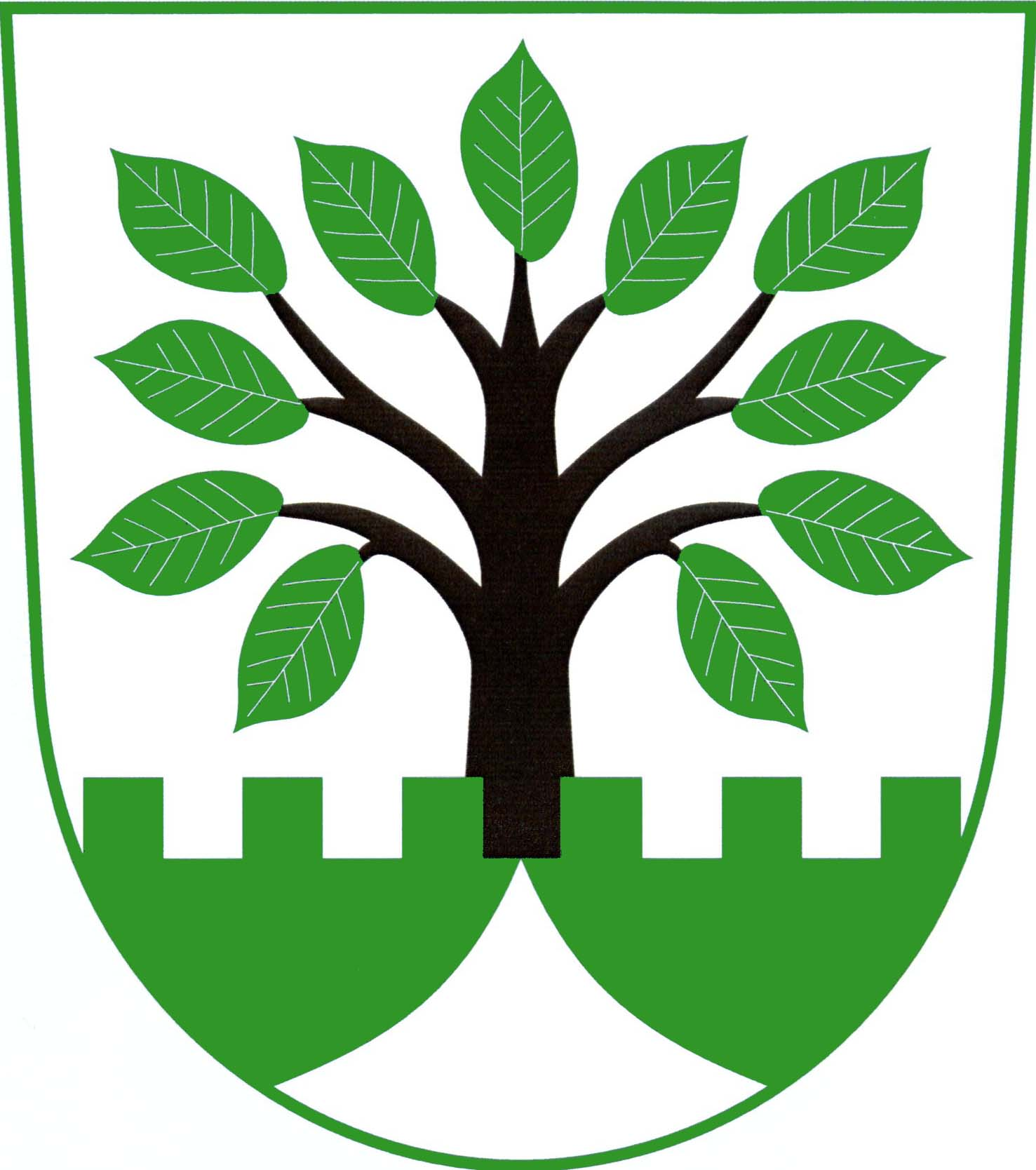 Znak obce Jilem (okres Havlíčkův Brod)